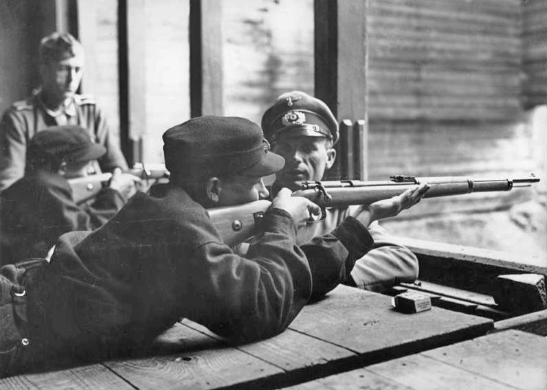 Wehrertüchtigungslager - Auftrag des Führers an die Hitler Jugend. Dem Schießunterricht wird in den WE.-Lagern ganz besondere Aufmerksamkeit gerichtet. Auch hier werden die Jungen von erfahrenen Frontkämpfern nicht nur in die hohe Kunst des Schießens eingeweiht, sondern sie lernen die Handhabe des Gewehrs von Grund auf.